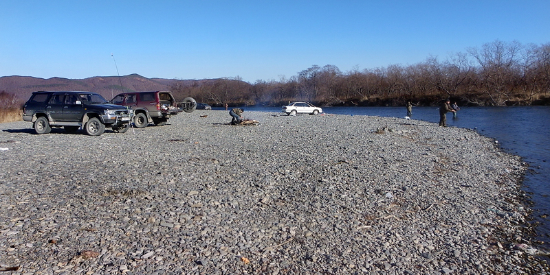 Река Плотникова: плёс для рыбалки на гольца (Salvelinus)